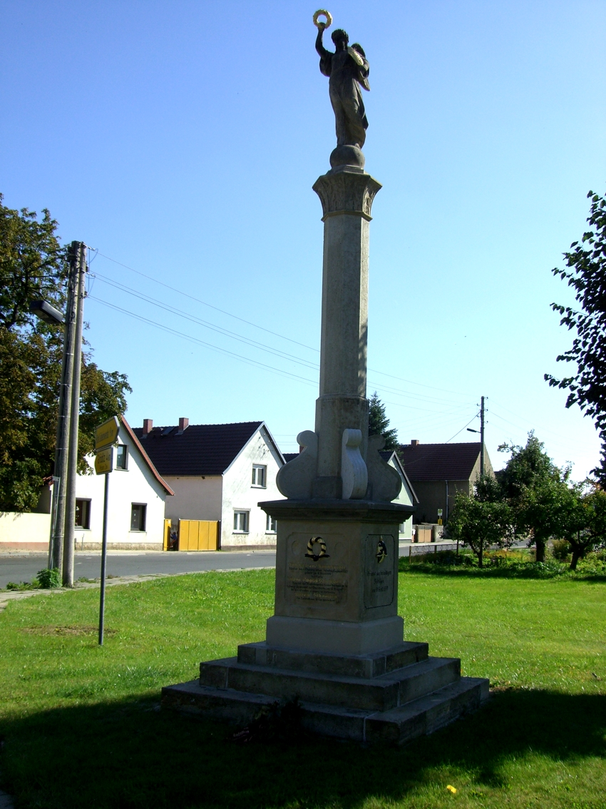 Stolzenhain, Deutschland, Denkmal für die Opfer des Deutsch-Französischen Krieges 1870/71.